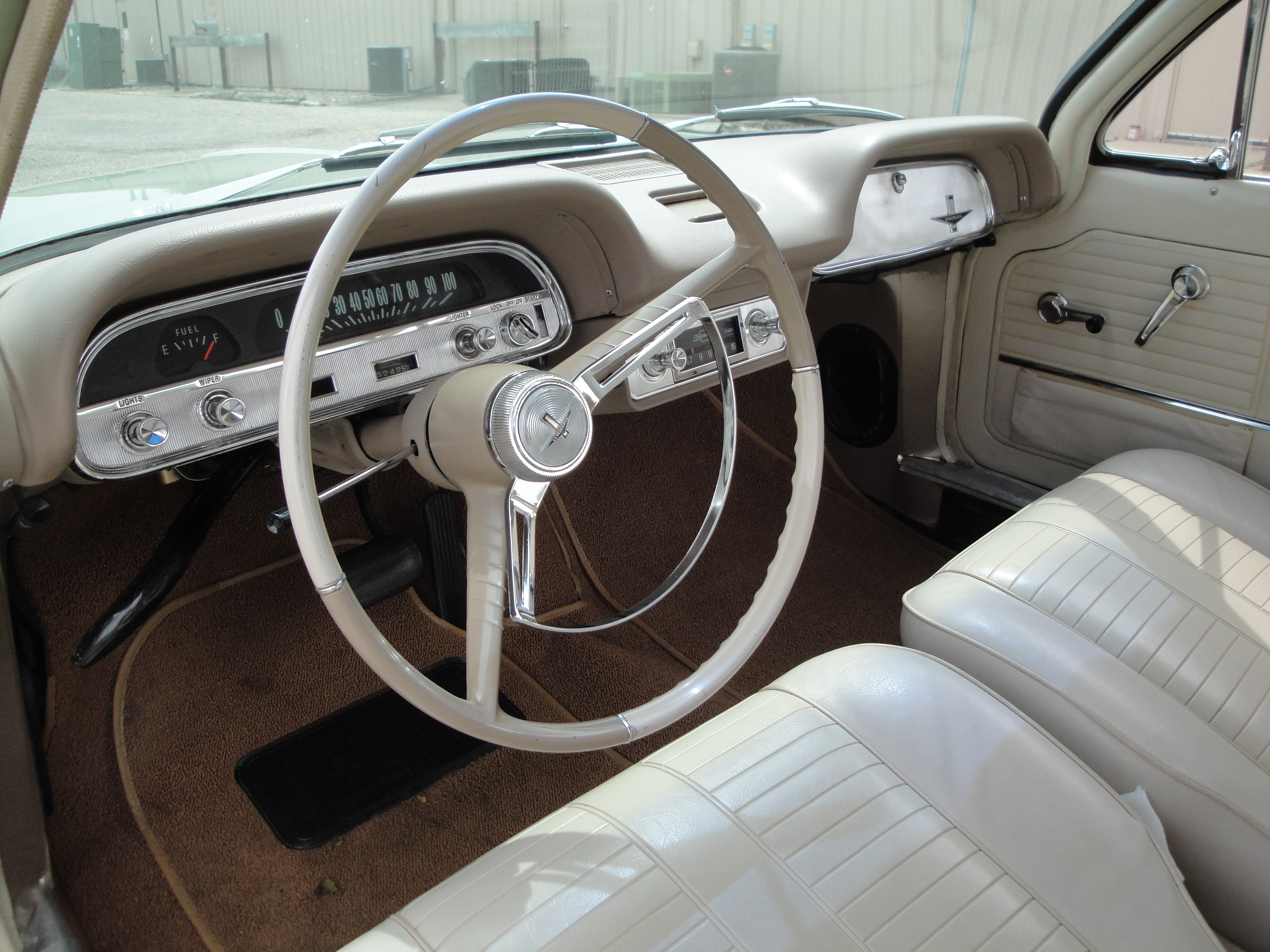 64 Chevrolet Corvair Monza